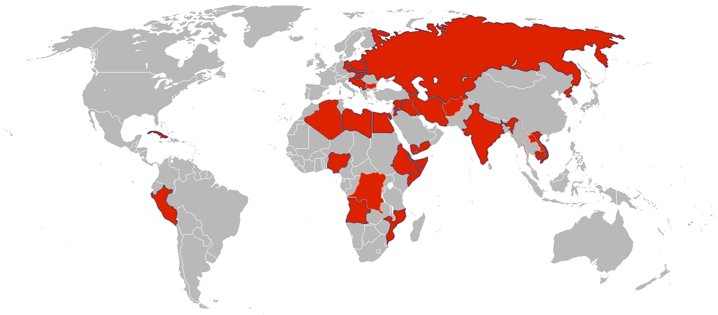 Nutzungsländer der Fla-Sfl 23/4